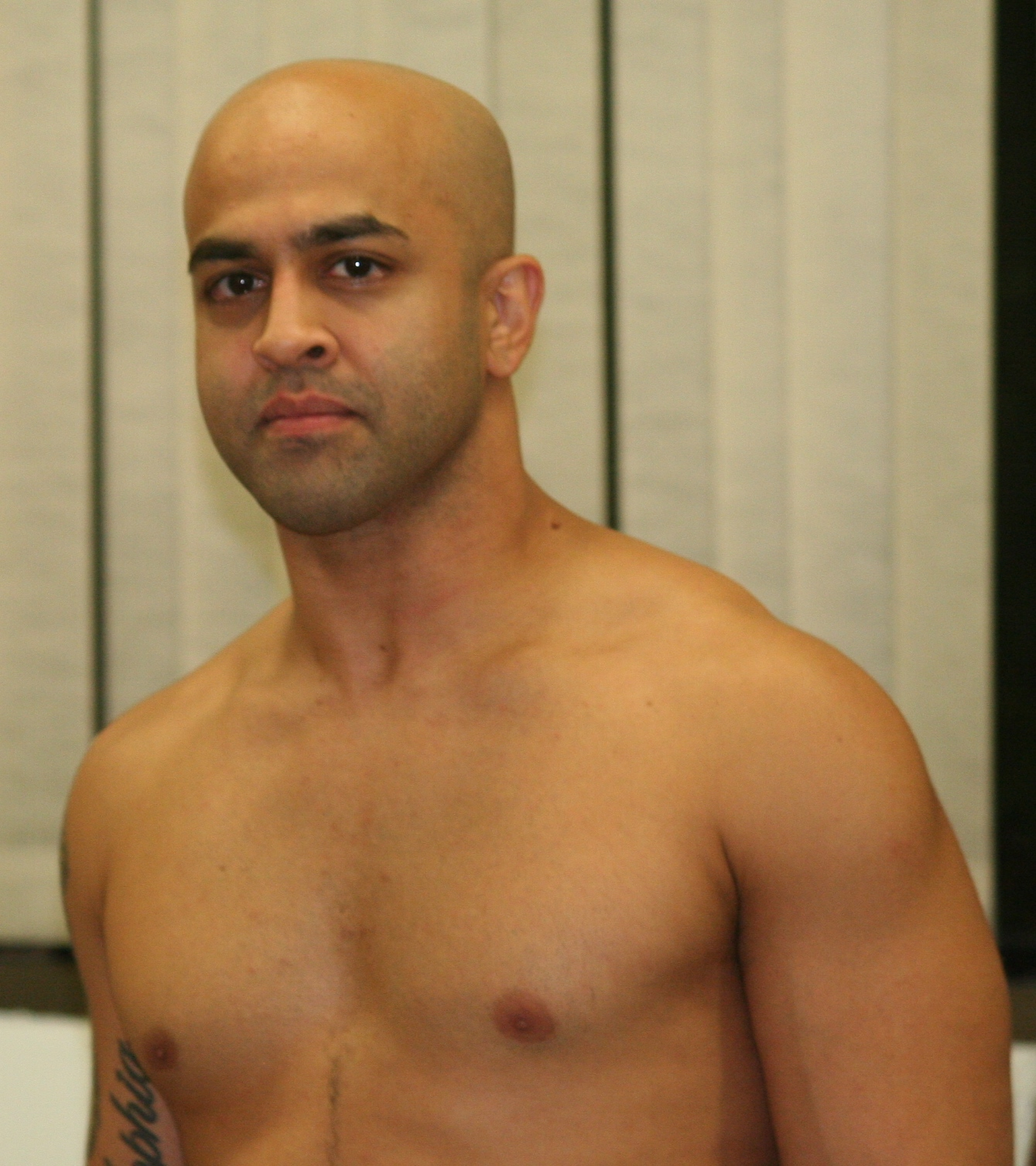 Sonjay Dutt en novembre 2015